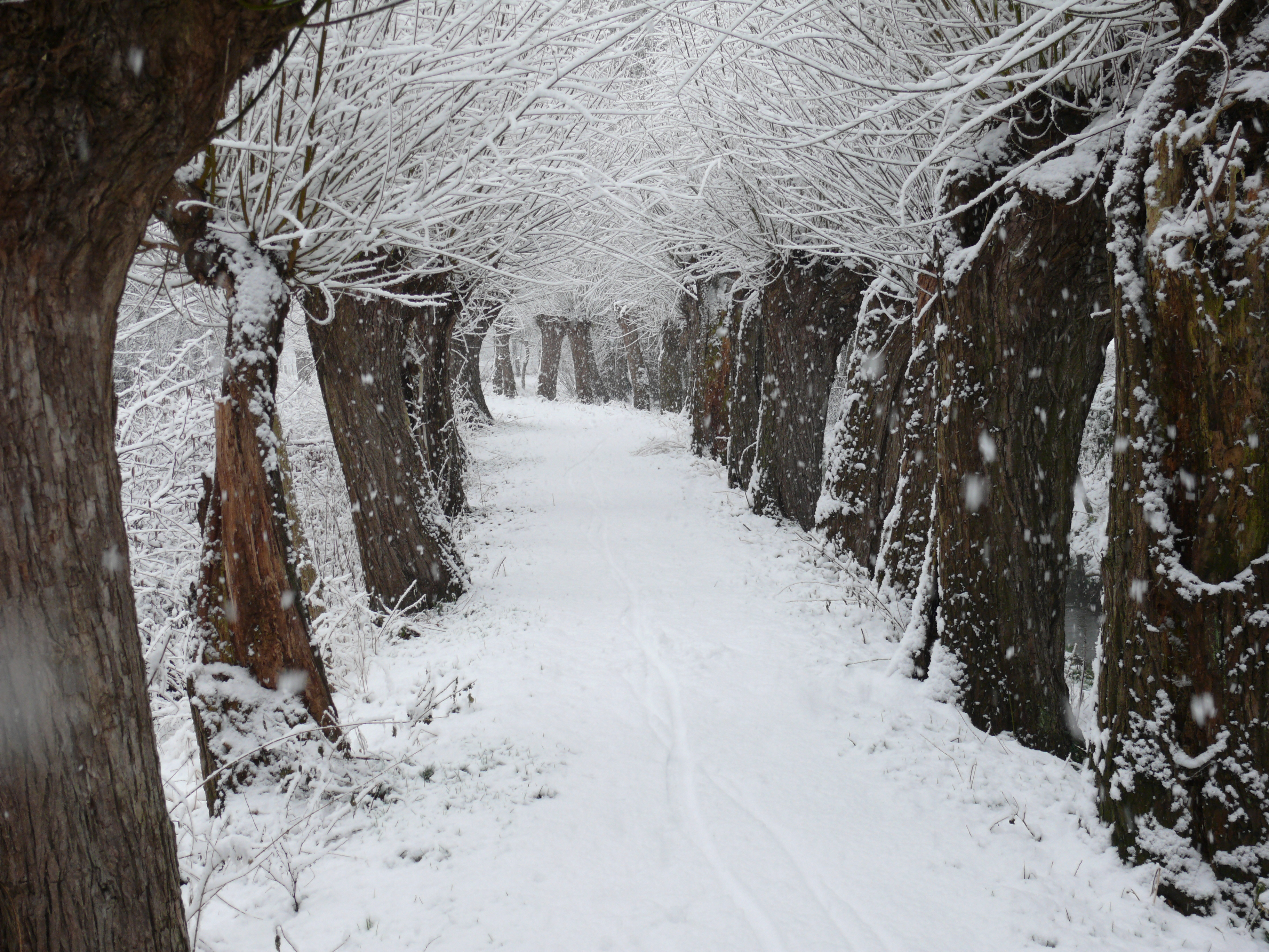 Mühlpfad in Mühlhausen bei Unna im Winter (Foto: Ulla Bigalke)